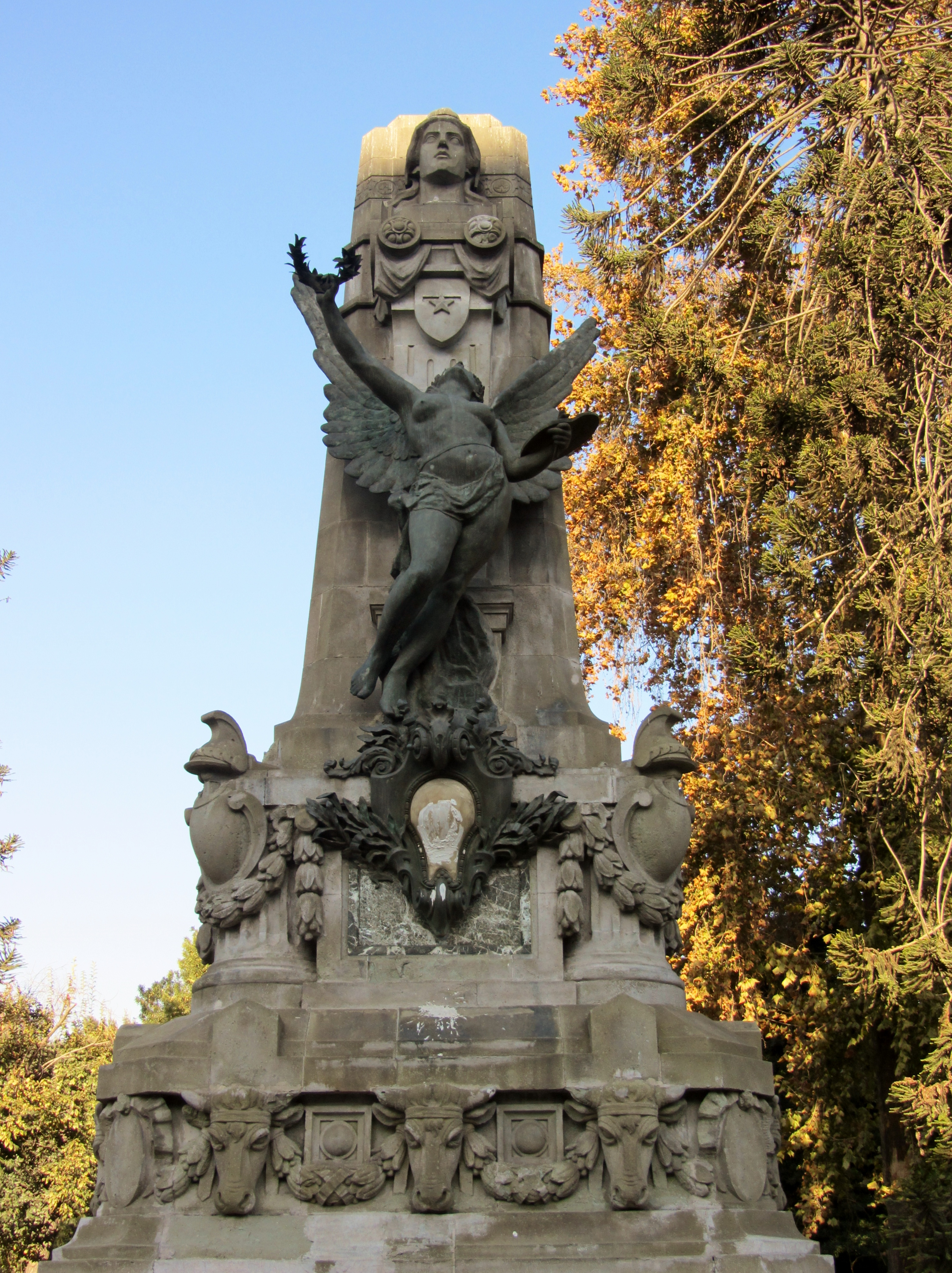 Monumento de la Colonia Francesa al Centenario de la Independencia, Parque Forestal, Santiago de Chile